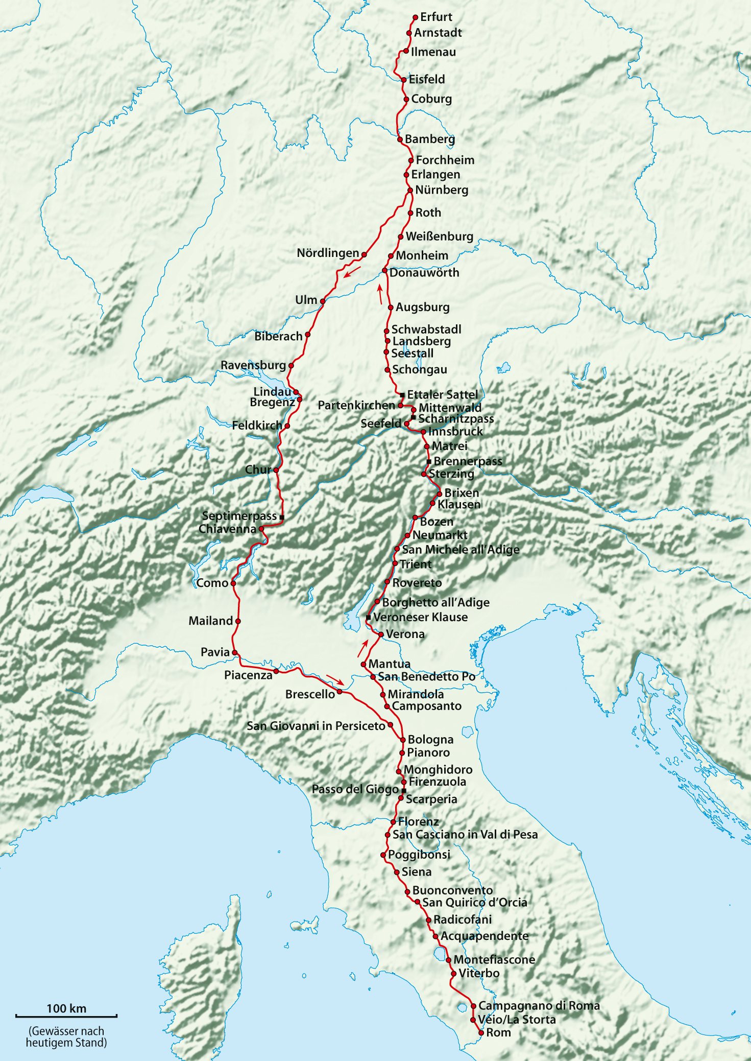 Eventueller Verlauf von Martin Luthers Romreise (1510/11?)